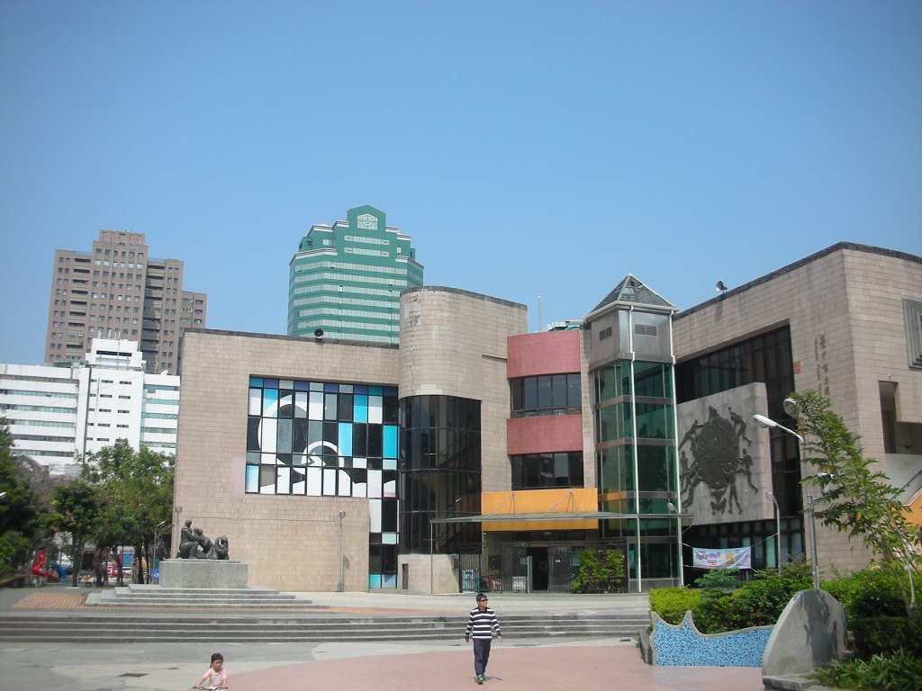 臺中市立圖書館大墩兒童分館是臺中市立圖書館座落於北屯兒童公園內的分館，由大墩分館管理